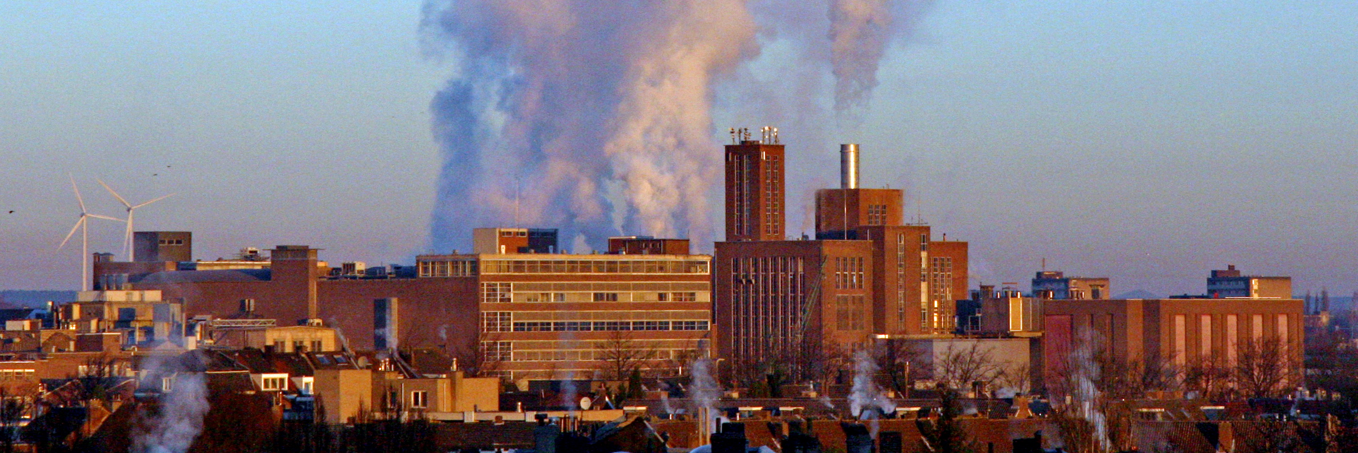 Morgenstimmung